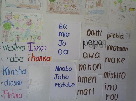 Pizarra de escuela inicial en Bena Jema